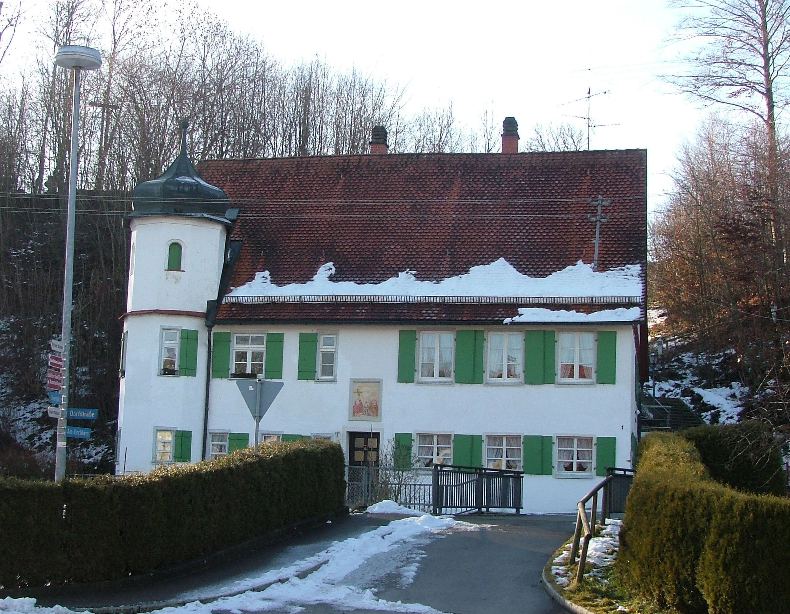 Pfarrhaus 1813 Über der Brücke über die Haslach befindet sich das ehemalige Pfarrhaus Haslach. In dem Haus der Kirchengemeinde ist das Probelokal Kirchenchor Haslach, Räume Kindergarten Haslach und unmittelbar dahinter beginnt der Kreuzweg Haslach und darin integriert die Lourdesgrotte Haslach.